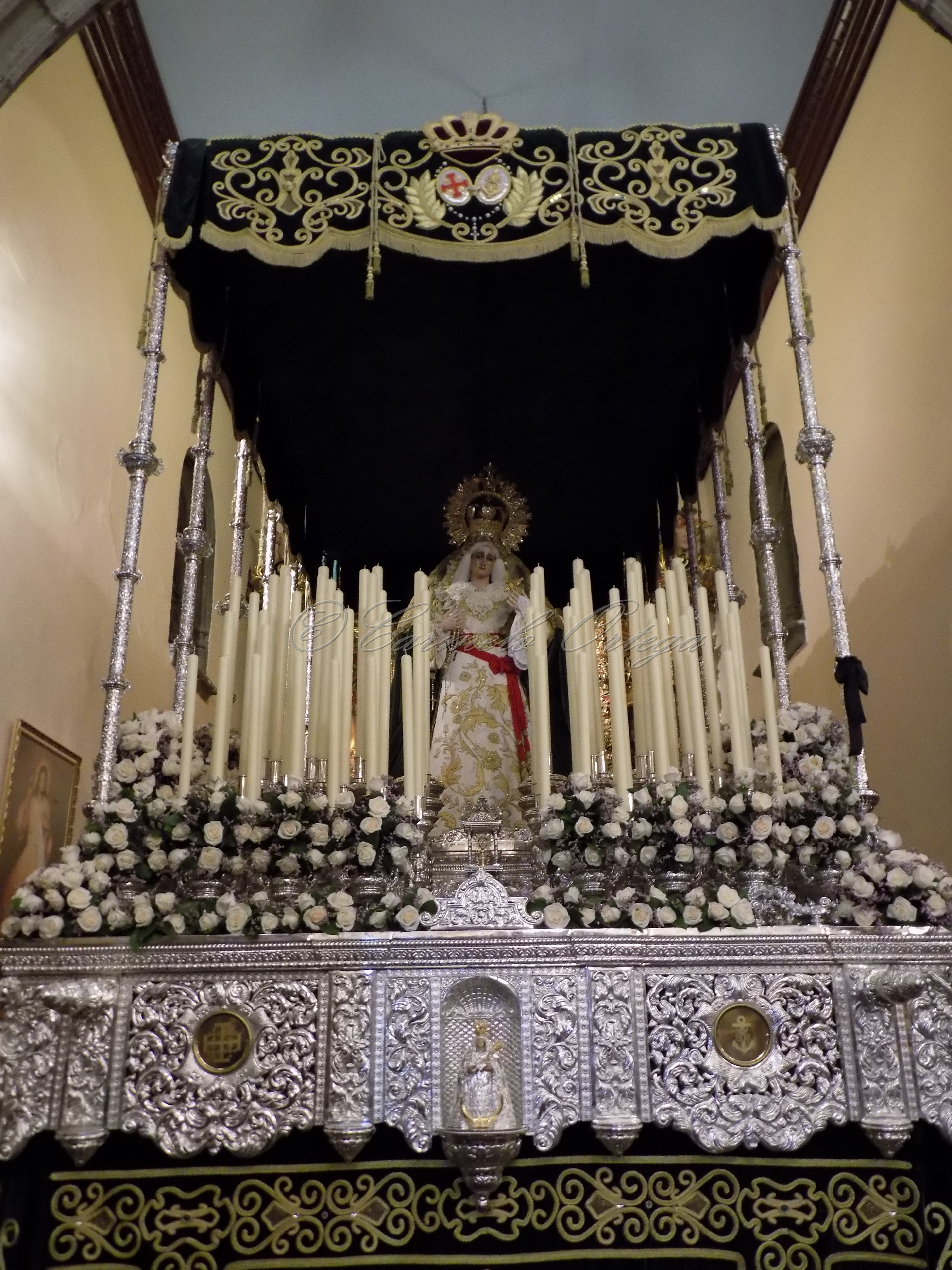 año2017